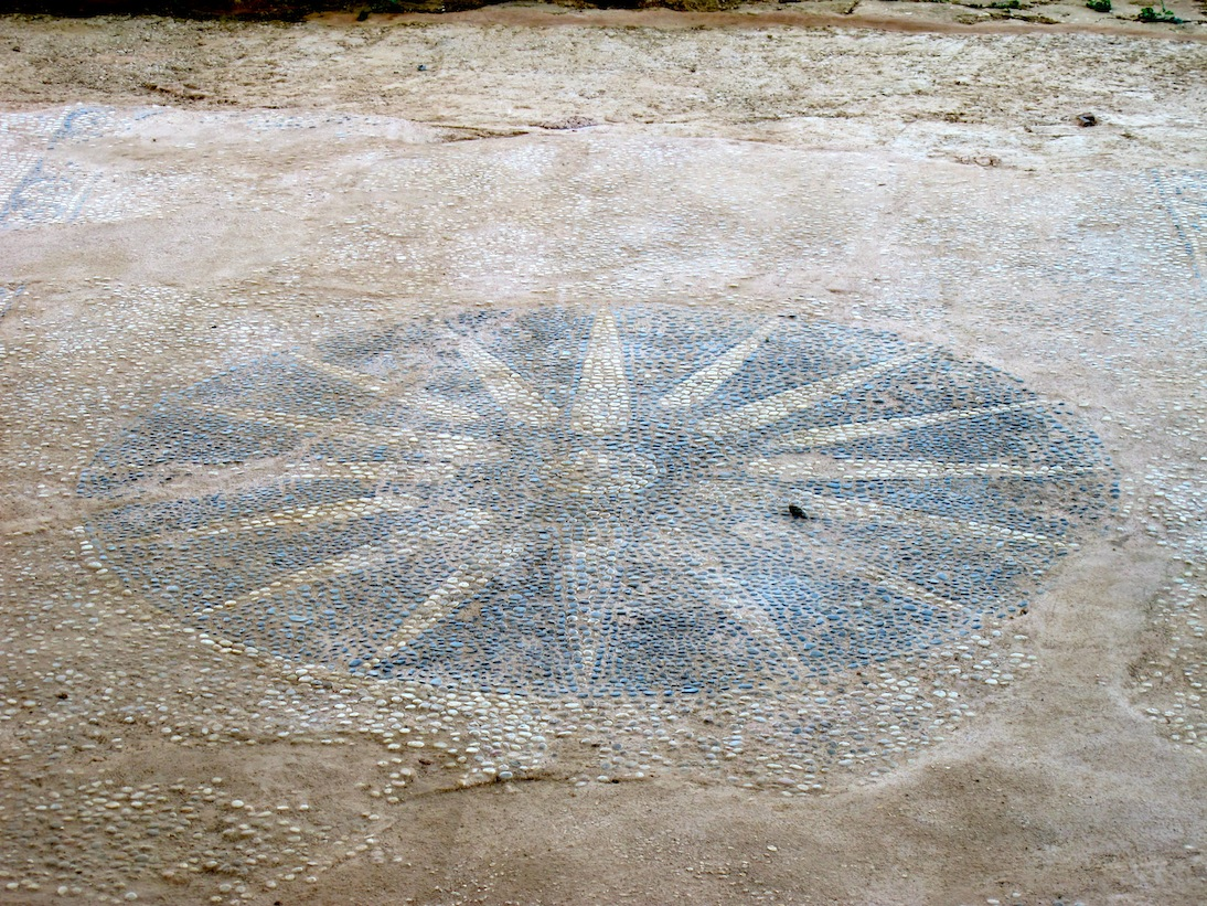 Ήλιος της Βεργίνας σε δάπεδο στην Γιτάνη